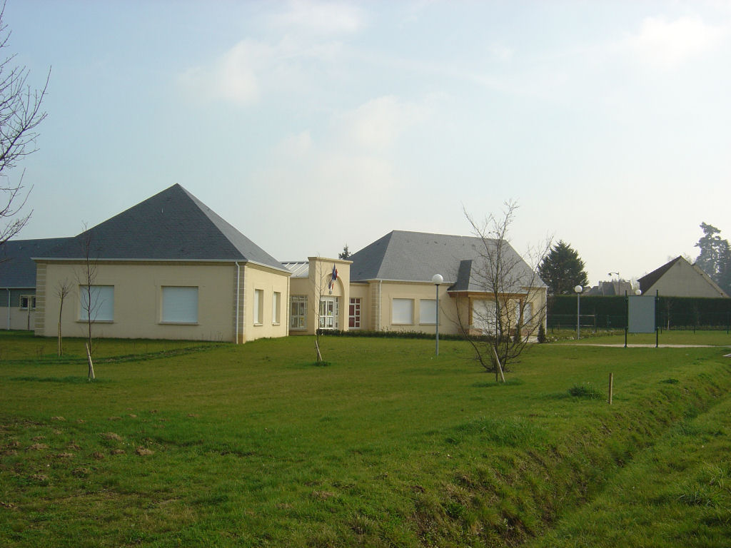 Nouvelle Mairie d'Angerville-la-Campagne (27 Eure France -Normandie)